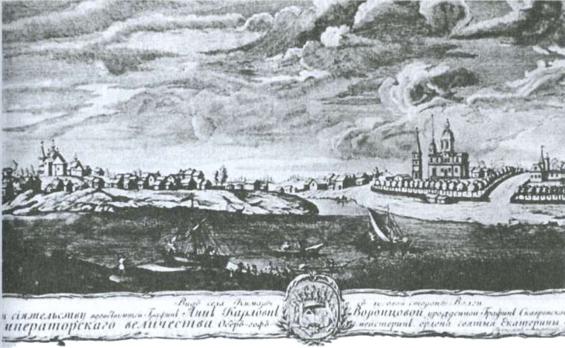 Гравюра «Вид на село Кимра с луговой стороны»